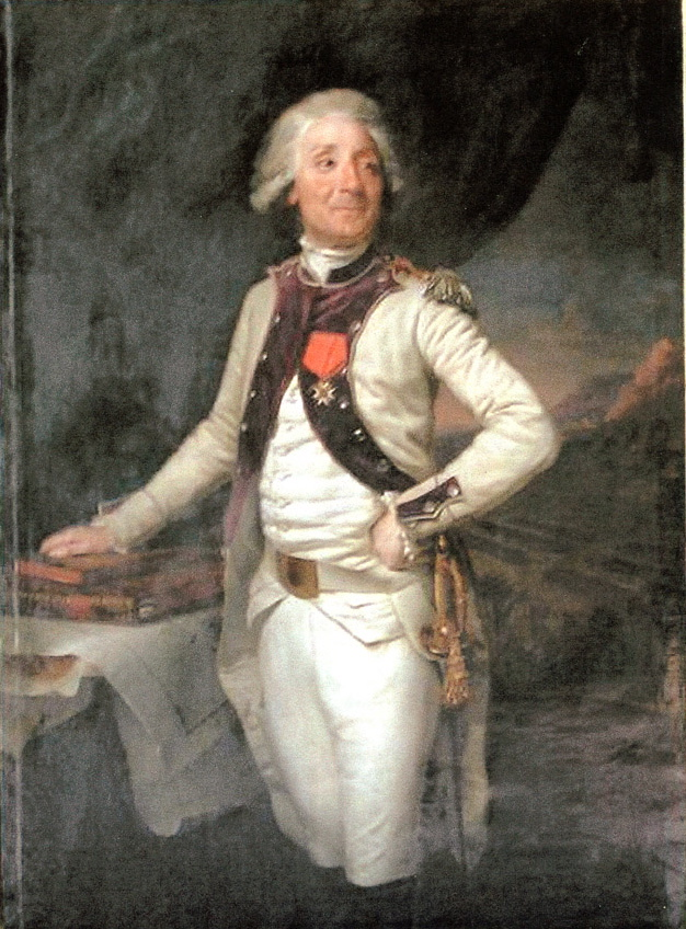 Jean-Baptiste Symon de Solémy (1746-1834), premier major général de l'infanterie à l'armée de Condé, Commandeur de l'Ordre de Saint-Louis (Régiment d'Auvergne règlement de 1779